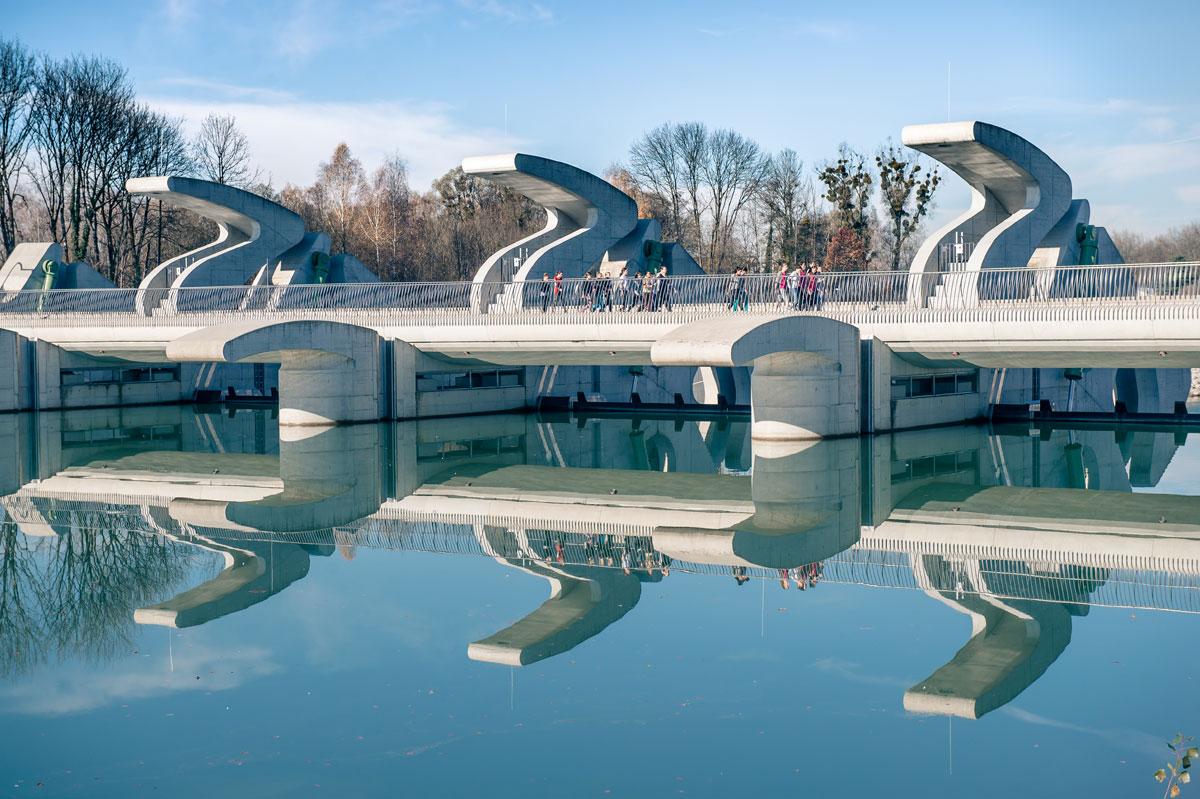 Wasserkraftwerk Sohlstufe Lehen in Salzburg, Inbetriebnahme 2013 mit einer Jahreserzeugung von 81.000 MWh.